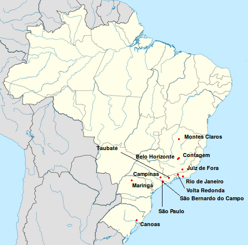 Cidades sede das equipes da Superliga Brasileira de Voleibol Masculino de 2013/2014 - Série A